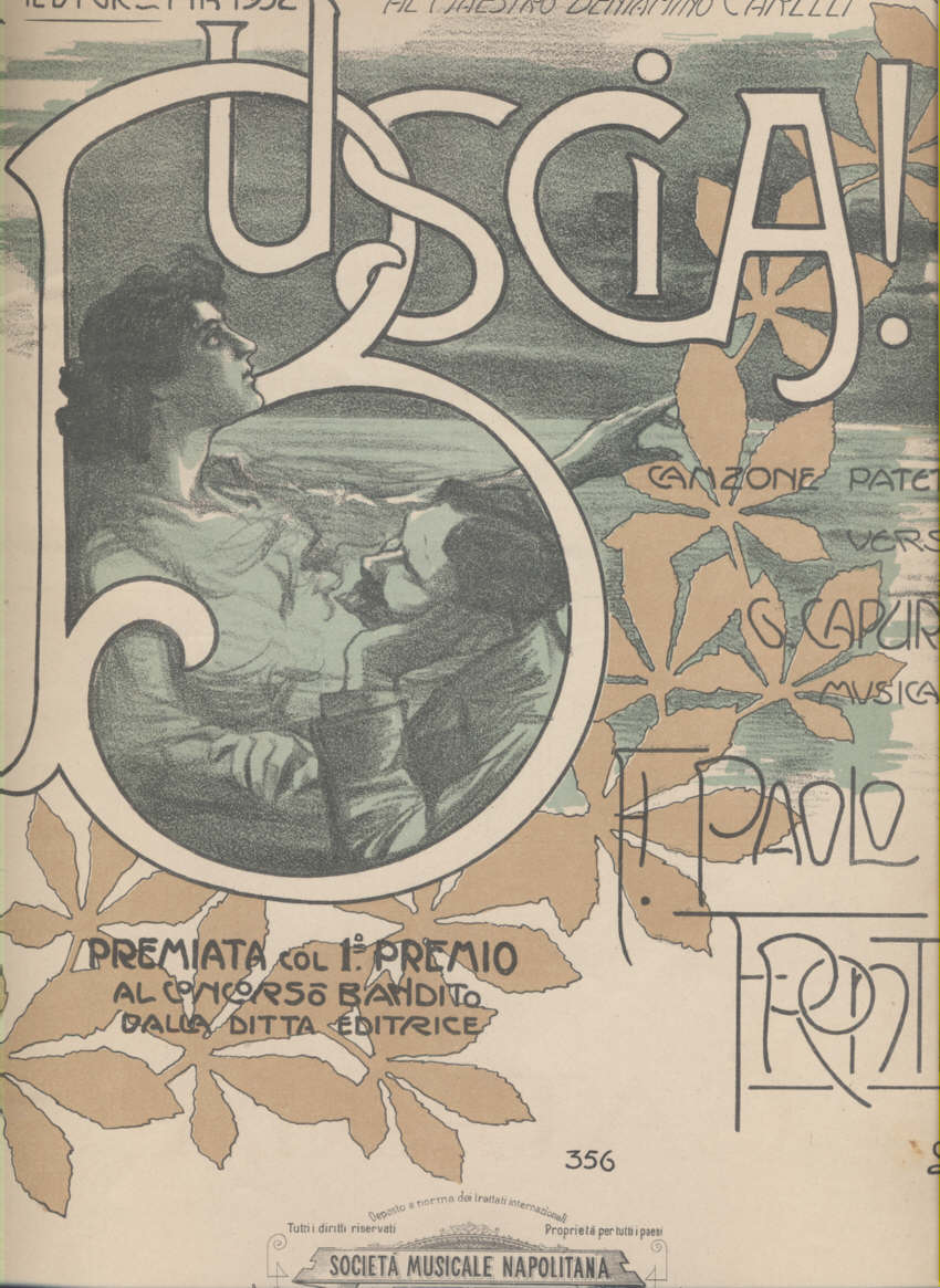 Riproduzione copertina di Buscia!, G. Capurro, 1902